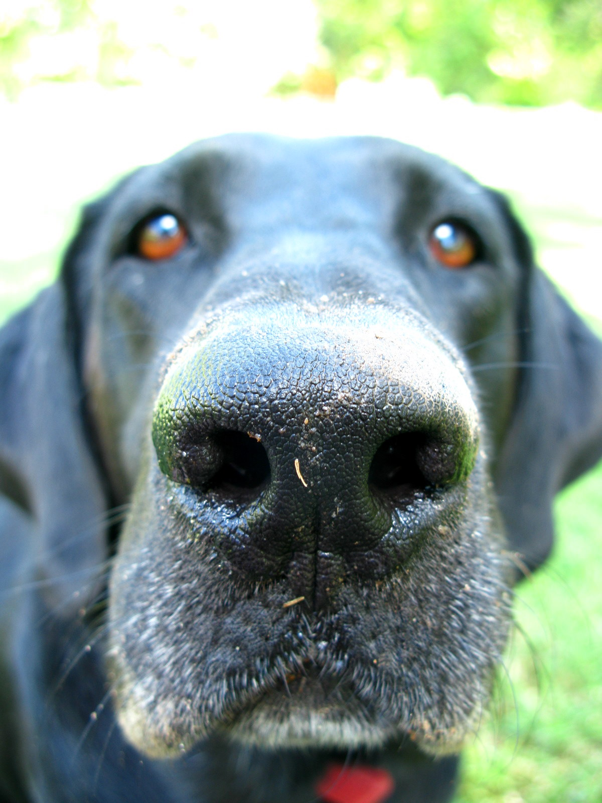 Txakur sudurra.